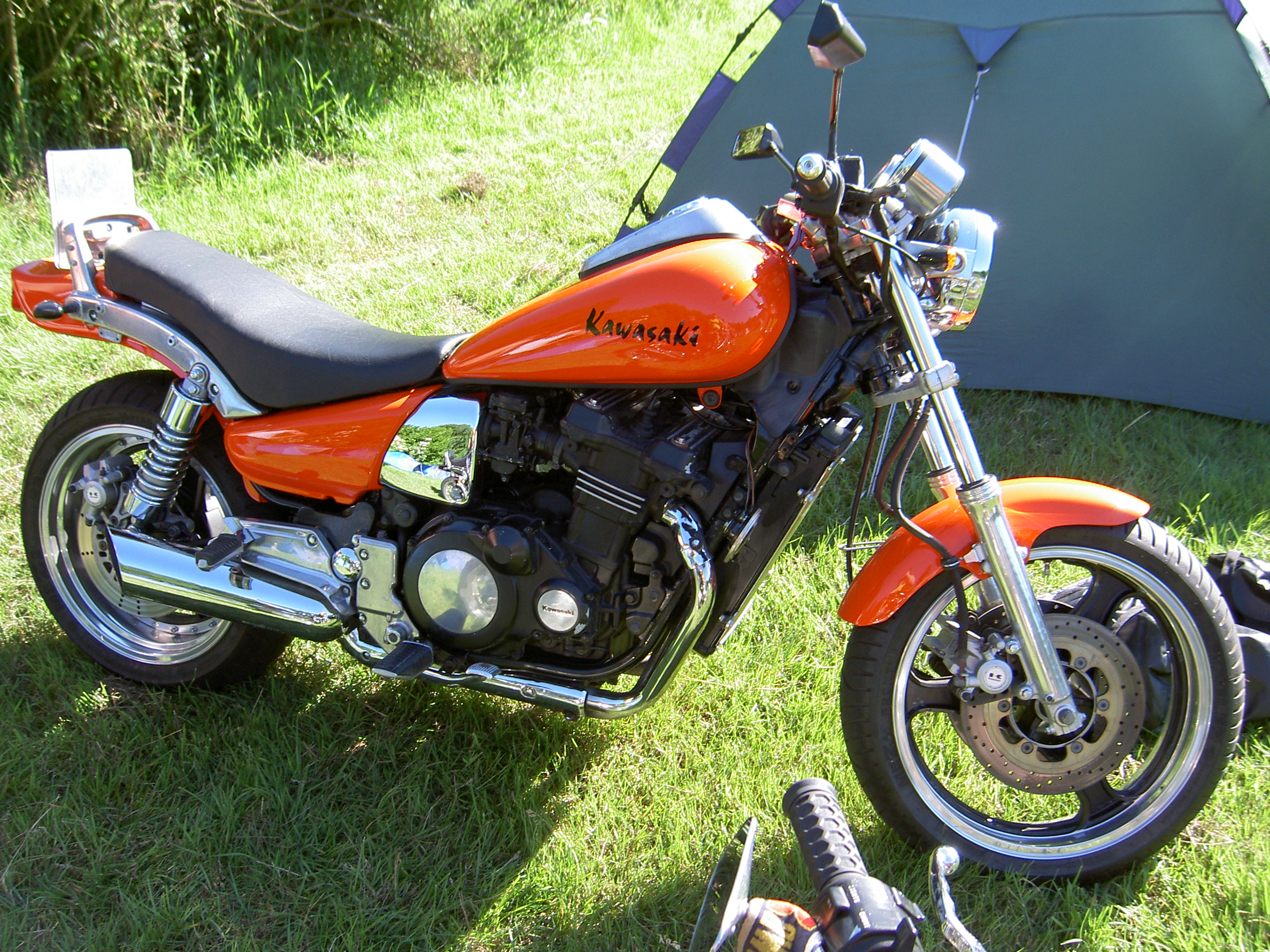 Eine dezent modifizierte Kawasaki ZL 1000.